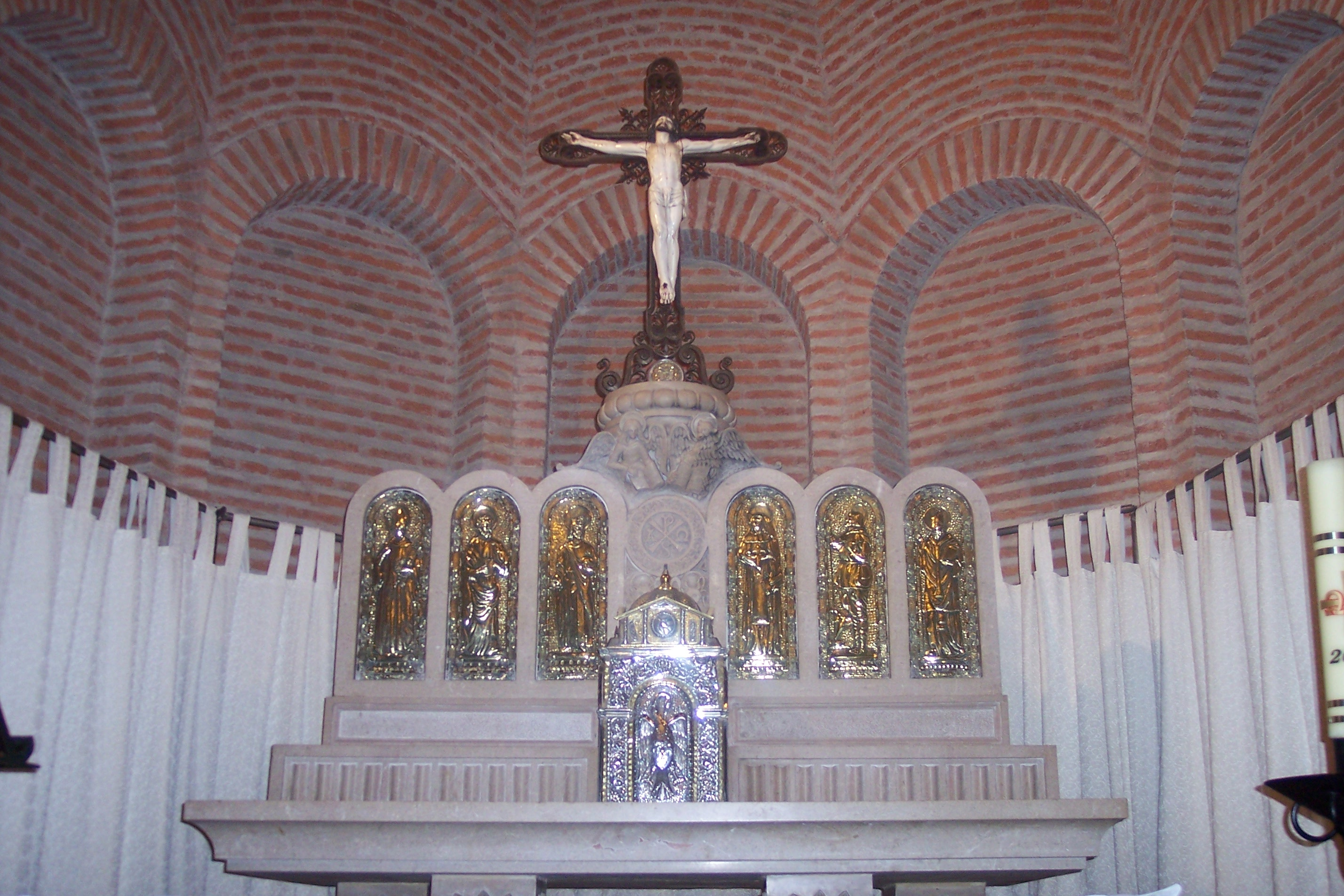 Capilla del Castillo de La Mota en Medina del Campo, Valladolid (España).